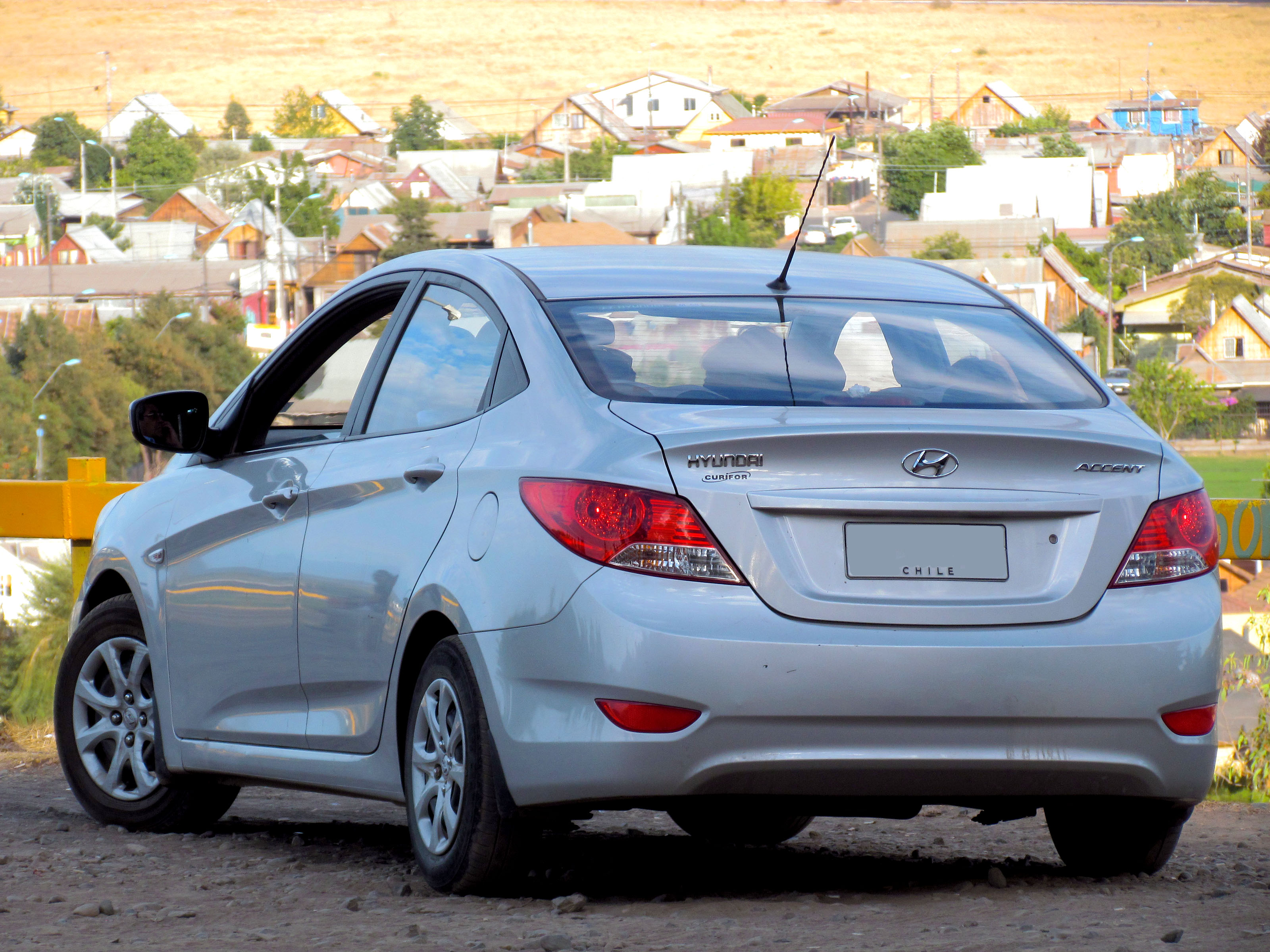 Hyundai Accent GL 1.4 2011